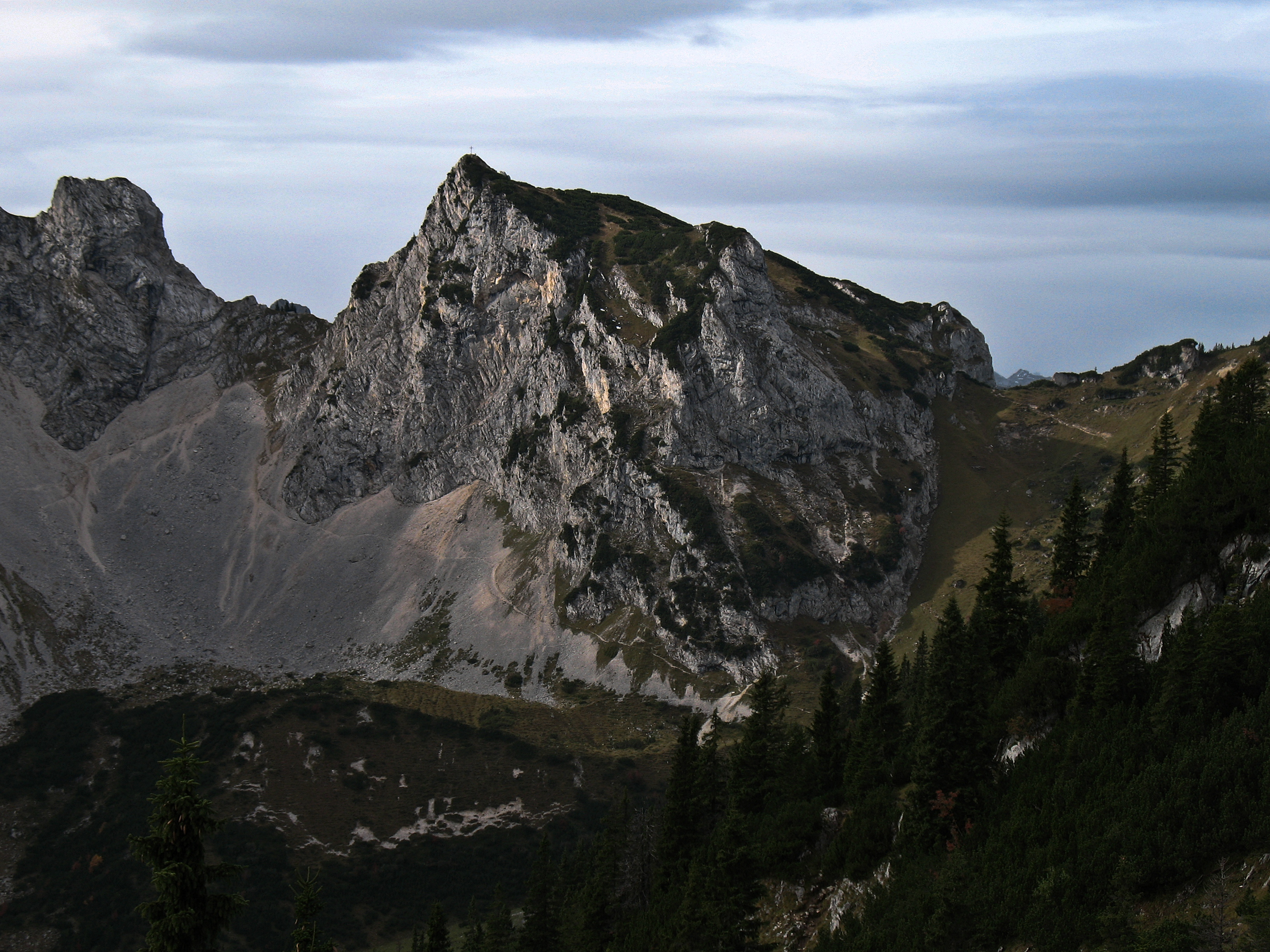 Schartschrofen (1968 m) aus Nordosten.